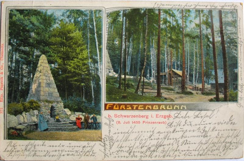 Postcard: Fuerstenbrunn b. Schwarzenberg i. Erzgeb.